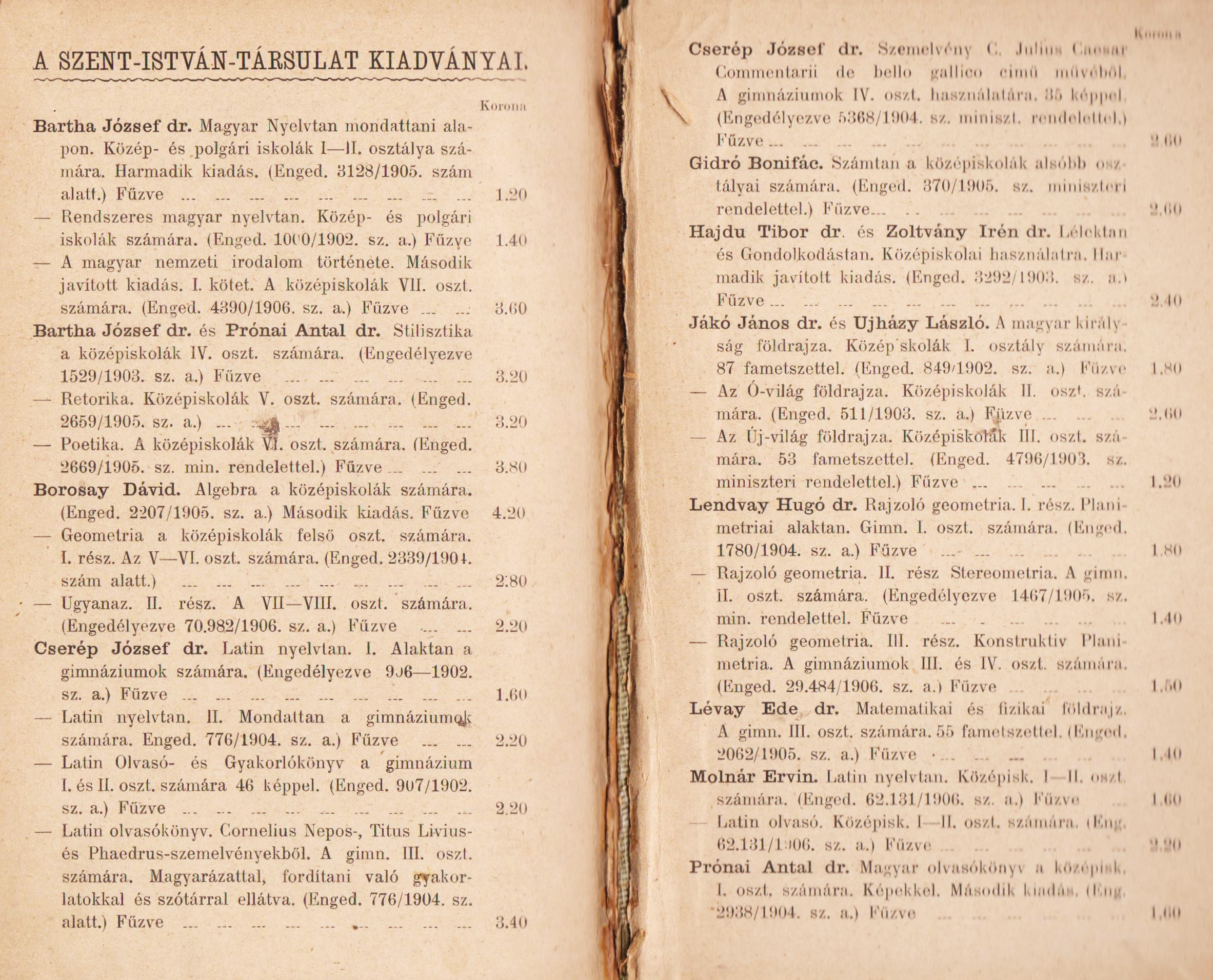 A Szent István Társulat kiadványai, hirdetés, IN: Prónai Antal Szavalókönyv